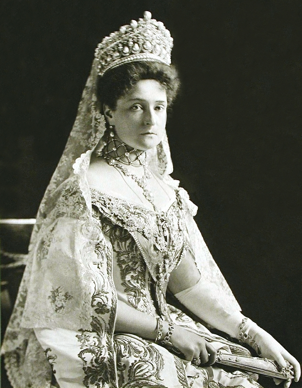 Портрет императрицы Александры Федоровны